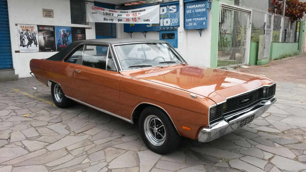 Charger 72 Marrom Castanha